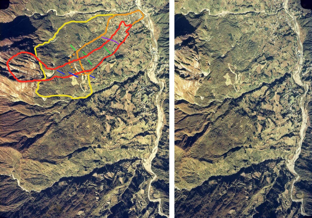 柵口雪崩災害。航空写真ステレオグラム（交差法）。赤枠：雪崩範囲。青線：雪崩導流堤。緑線：雪崩減勢柵。紫線：雪崩防護柵。黄色枠：1947年に起きた地すべりの範囲。オレンジ枠：地すべりのうち変動の大きな部分。オレンジ点線：地すべりで生じたがけ（滑落崖）。